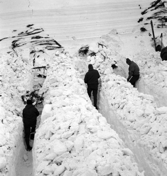 Przekopywanie lawiniska po tragedii w Bialym Jarze